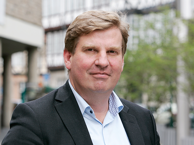 Offizielles Foto von Sören Auer